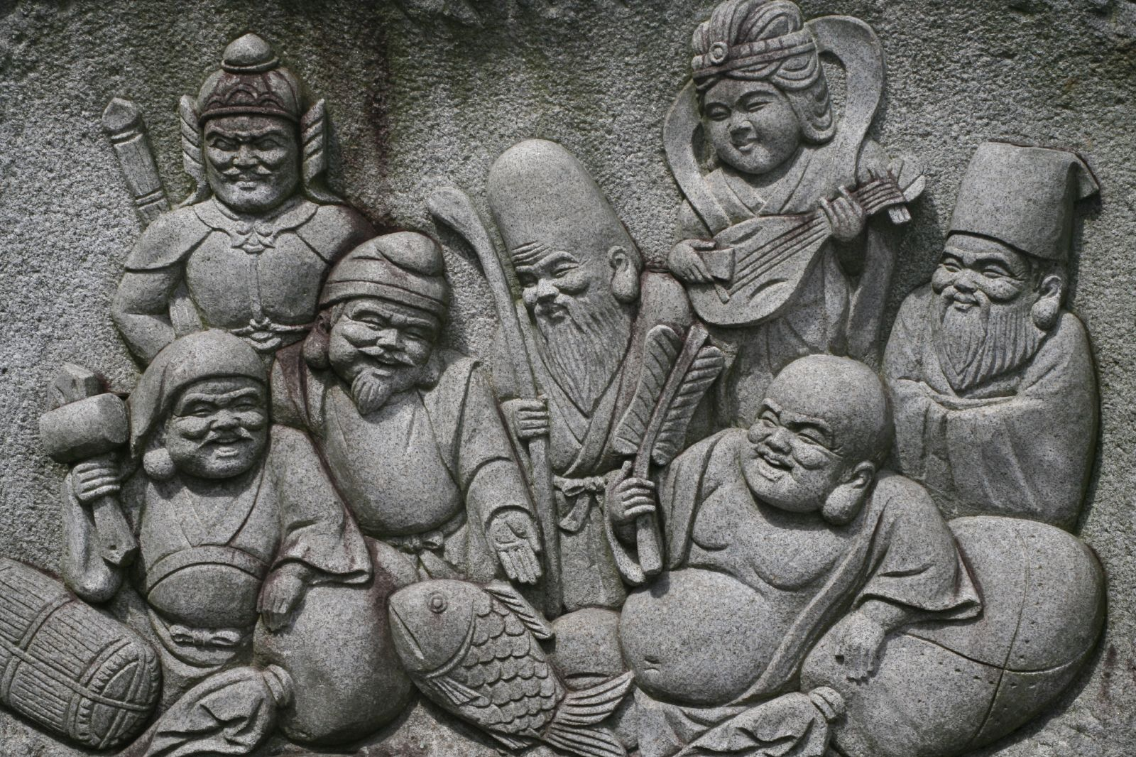 Seven lucky Gods of Japan Daikokuten (Shiva, Mahakala), Bishamonten, Ebisu, 3.Fukurokuju, Benzaiten, Hotei and Jurōjin